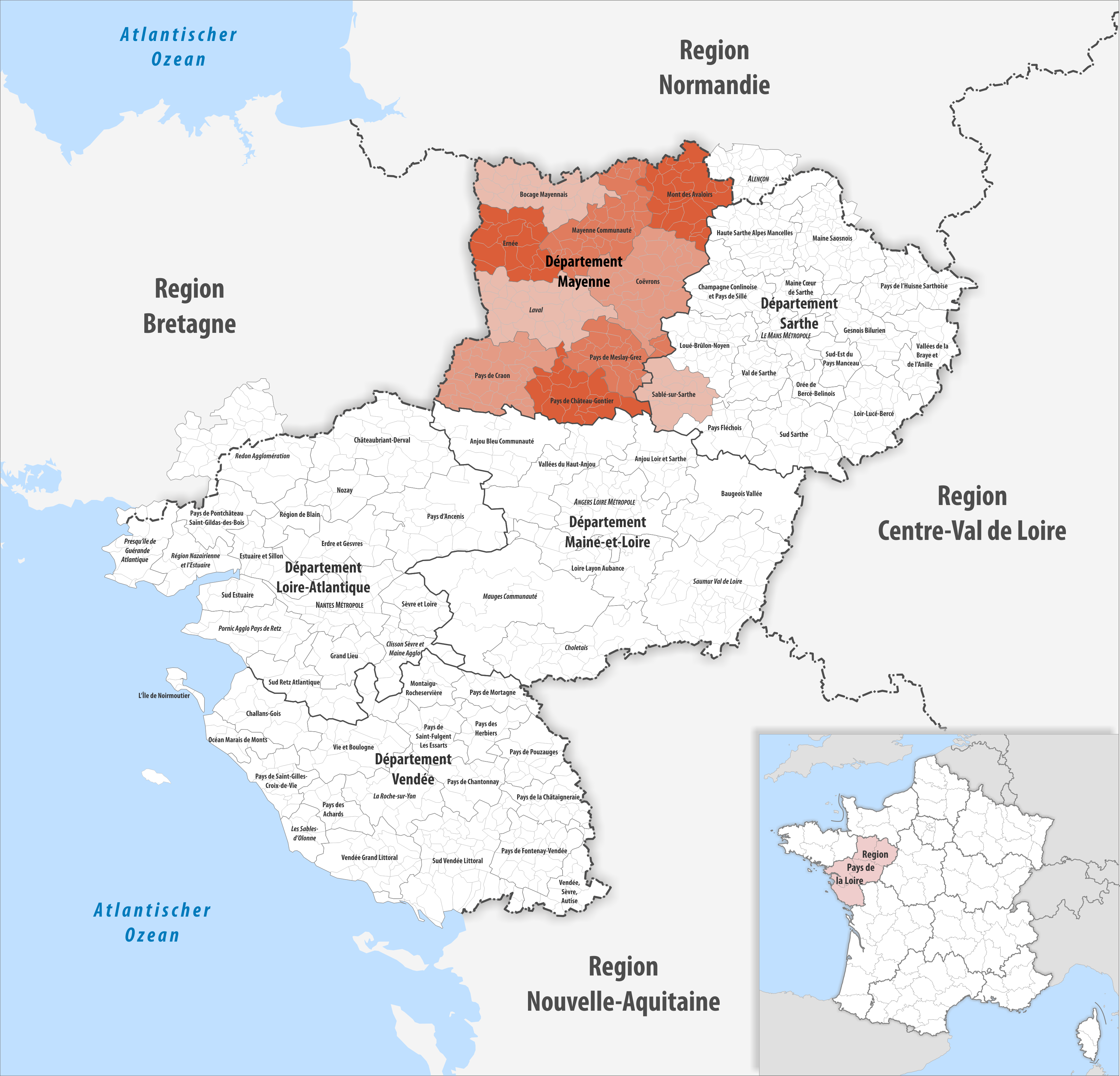 Gemeindeverbände im Département Mayenne